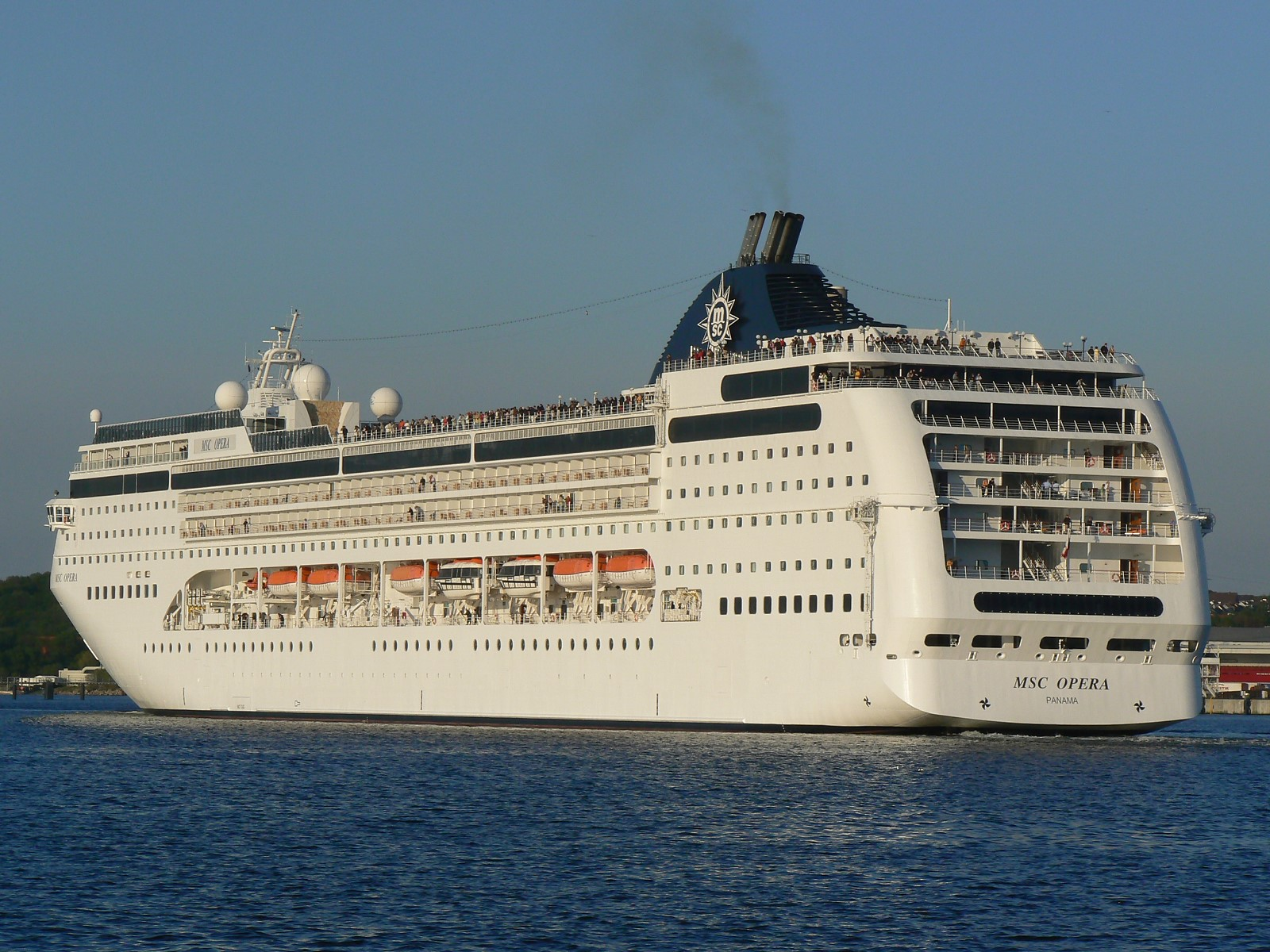 Kreuzfahrtschiff MSC Opera im Kieler Hafen (Heck-Ansicht).